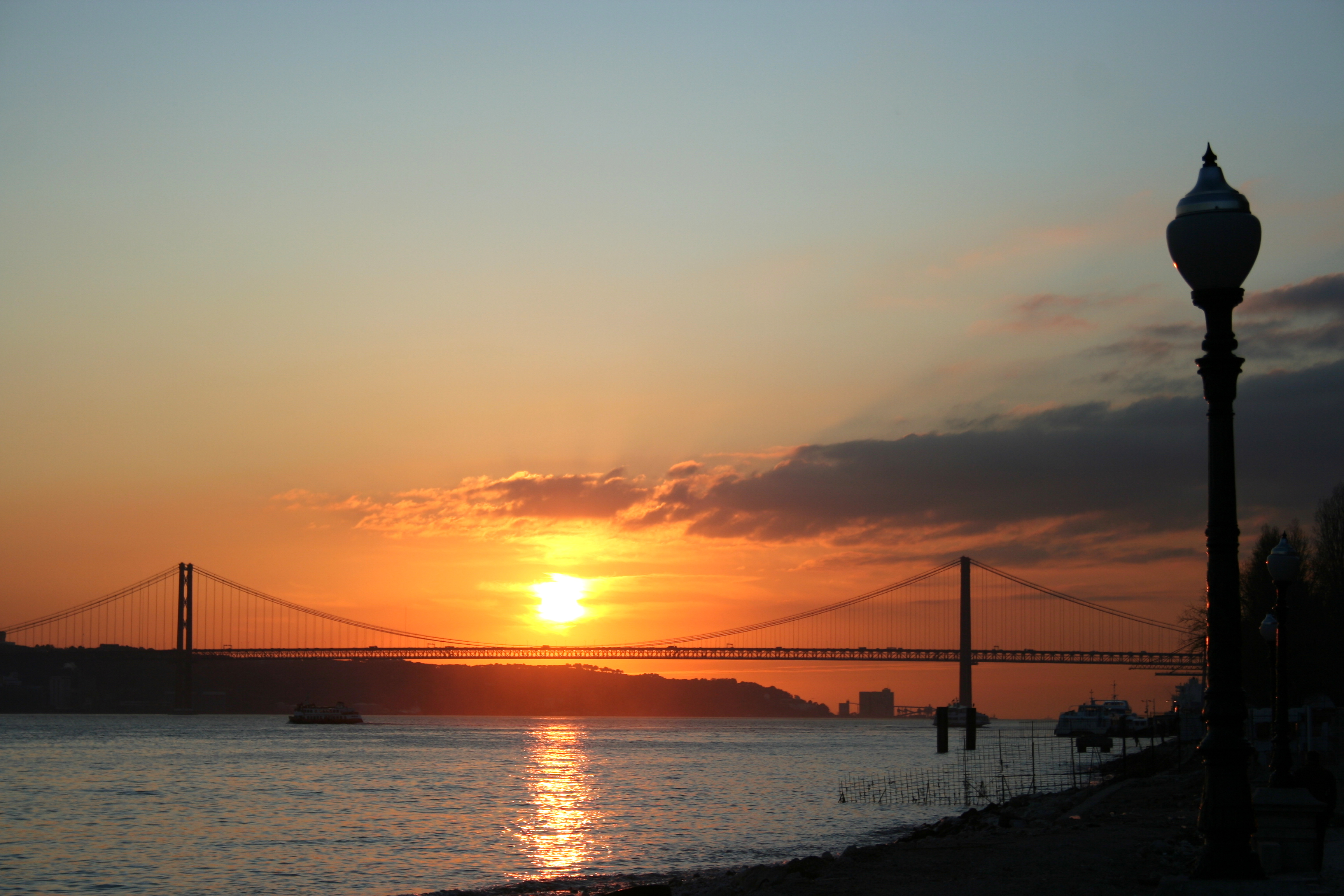 Atardecer sobre el Puente 25 de Abril en Lisboa